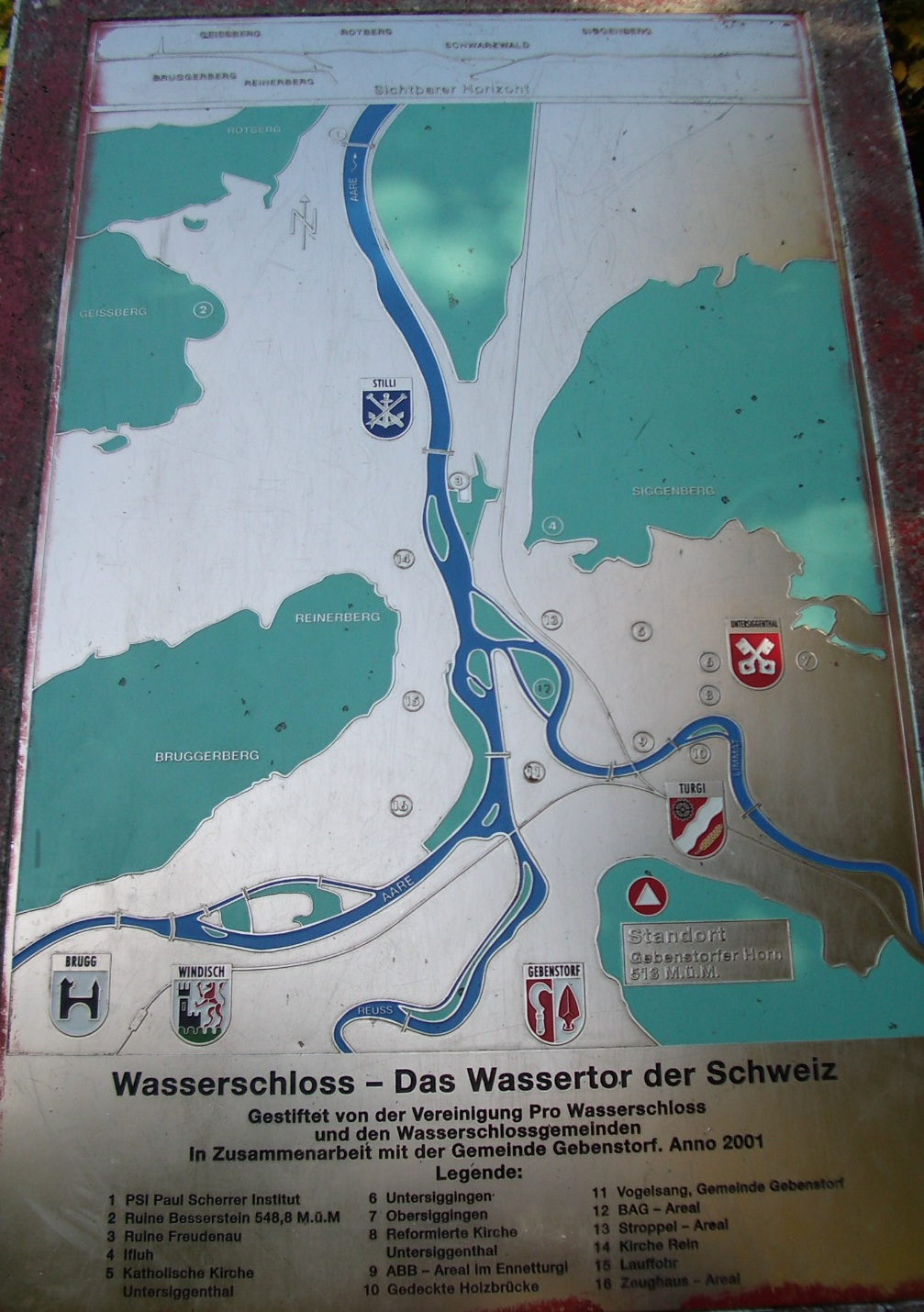 Gebenstorf AG, Wasserschloss self-made, October 2005